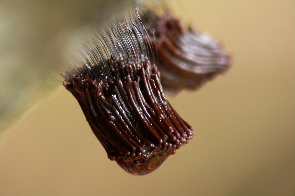 Schleimpilz (Stemonitis axifera)